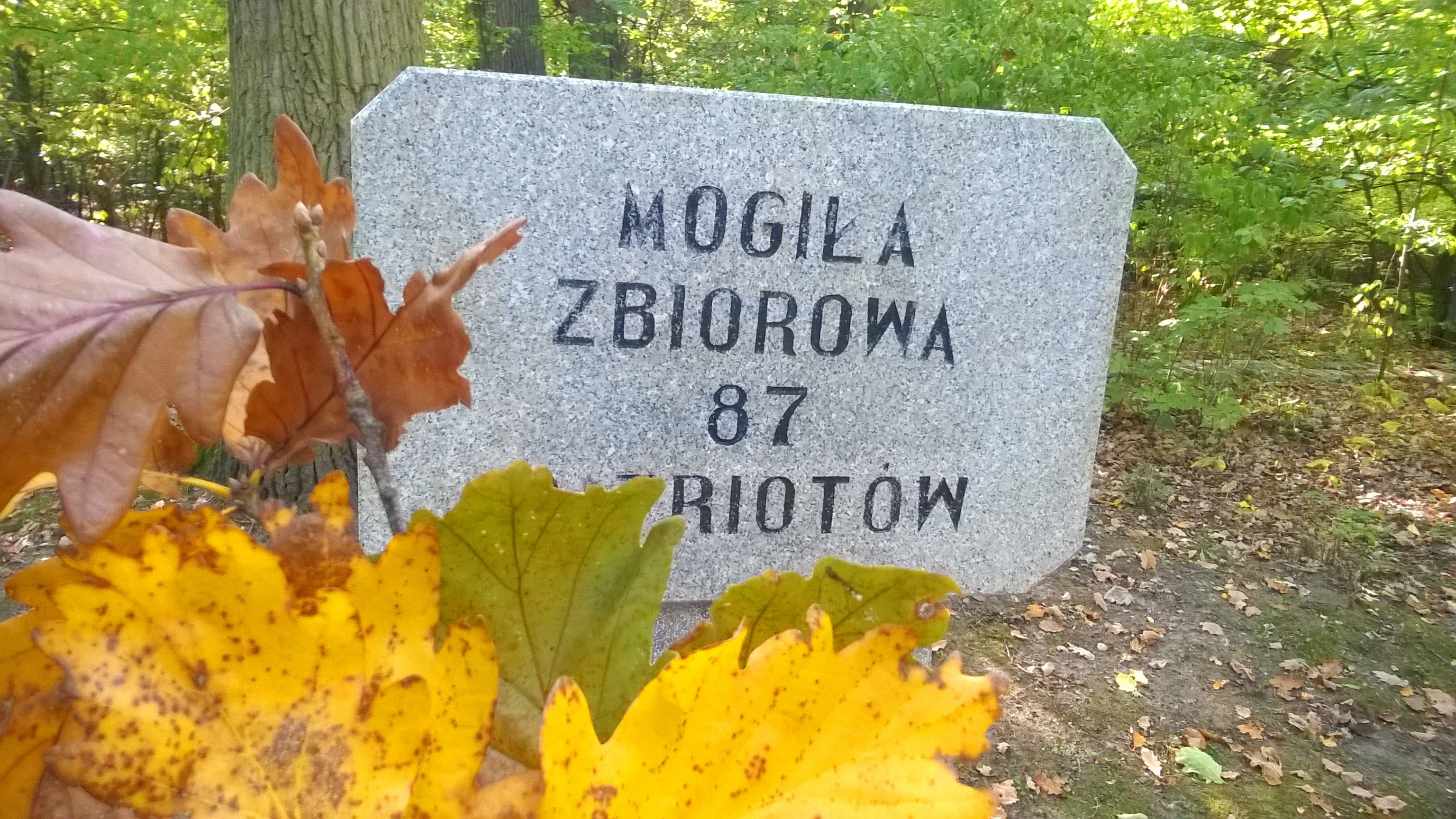 Cmentarza Ofiar Hitleryzmu w Toruniu2